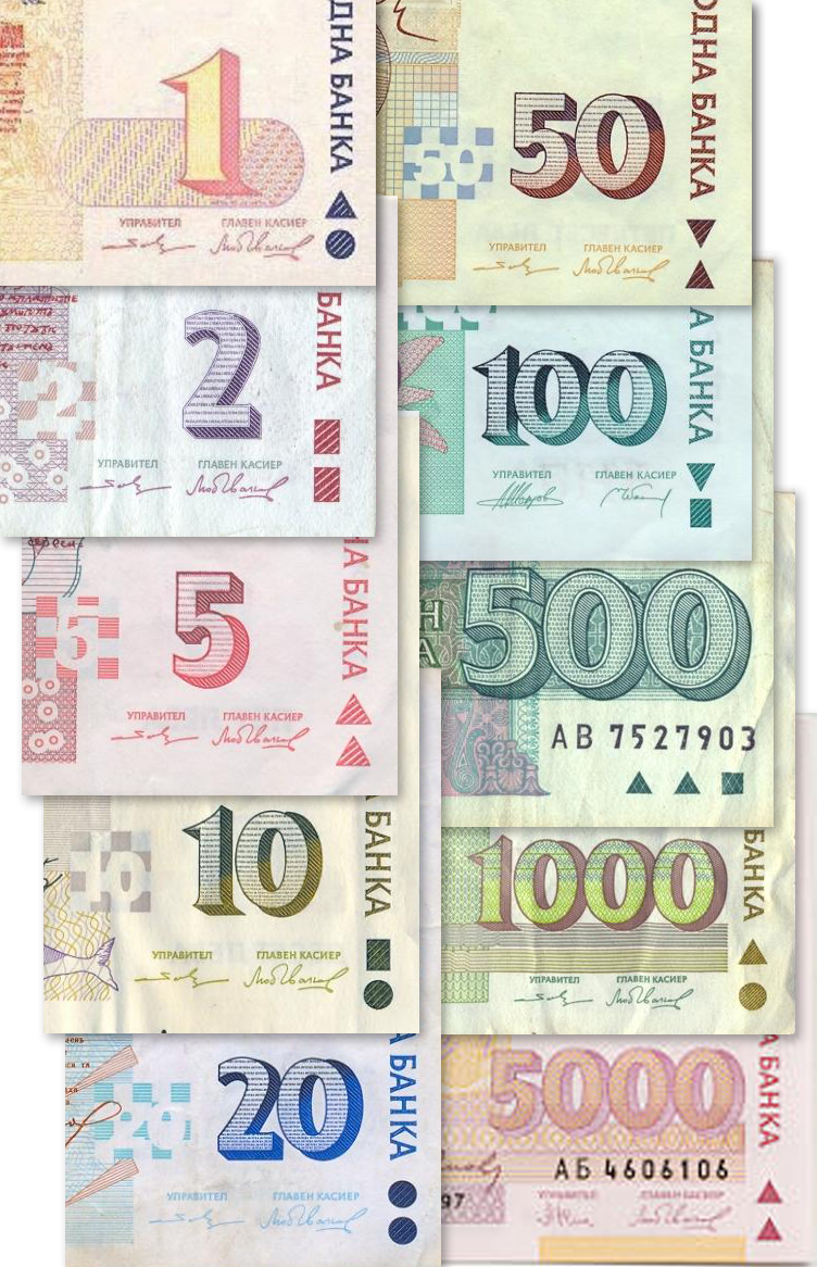 Знак за слепи граждани – релефно изображение на геометрични фигури - комбинация от кръгове, триъгълници и квадрати.